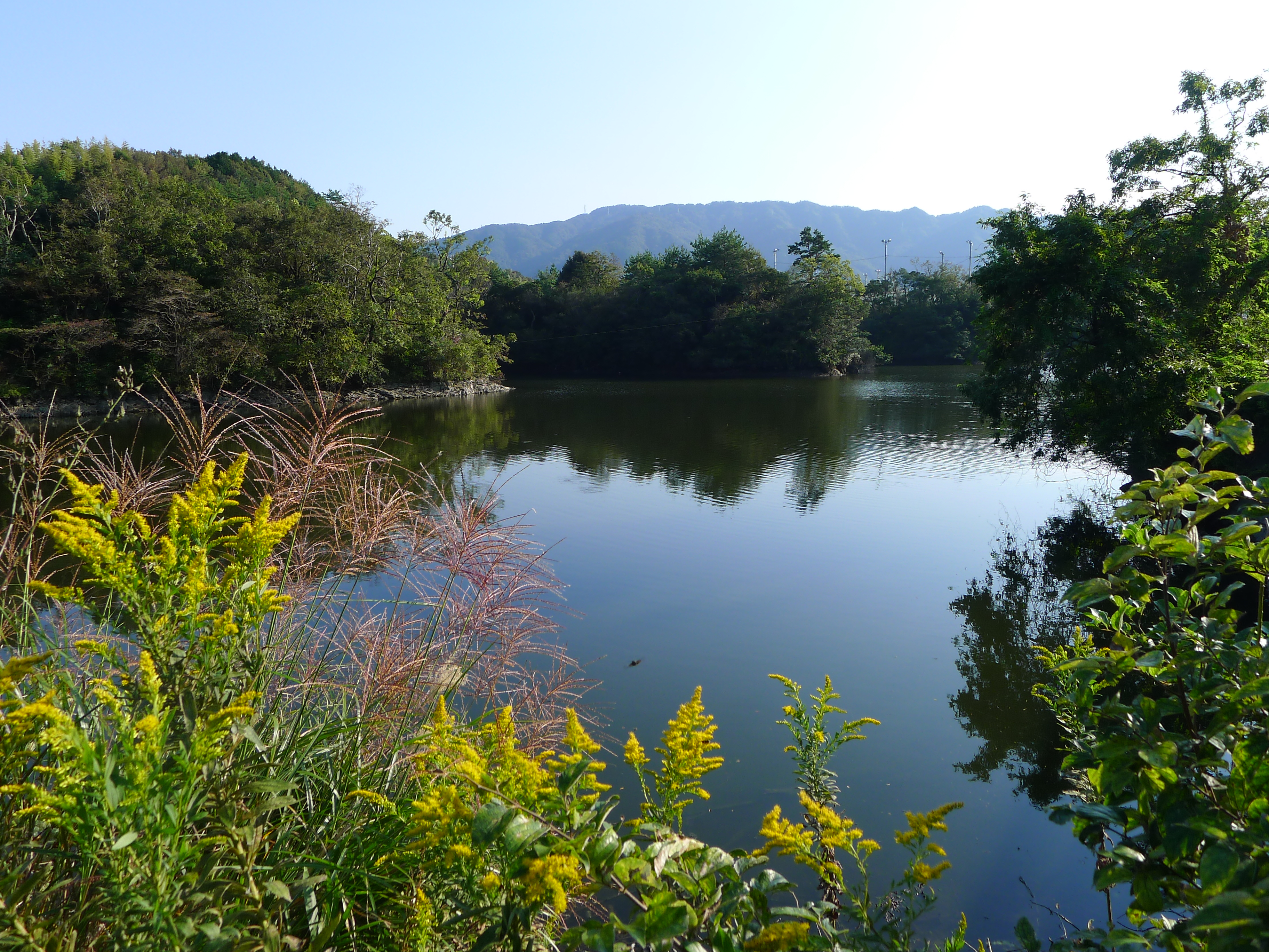 神武天皇東征の際に土蜘蛛を退治した場所と伝わる蜘蛛池